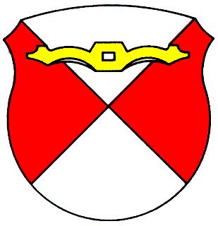 Wappen Tentlingen